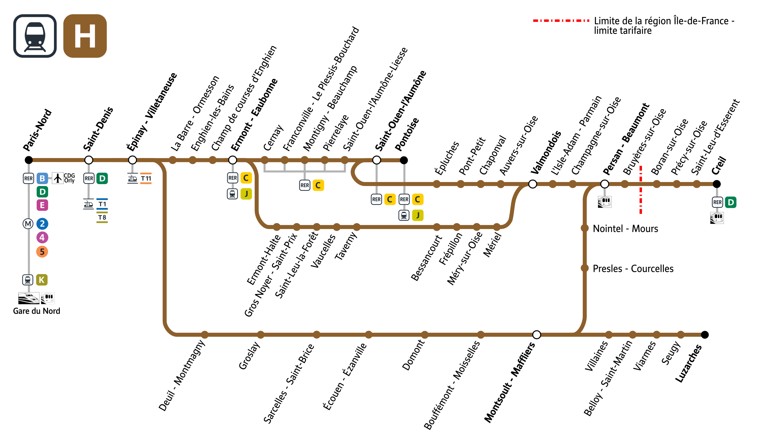 Plan schématique de la ligne H du Transilien avec indication des correspondances (RER, Transilien, métro et tram).